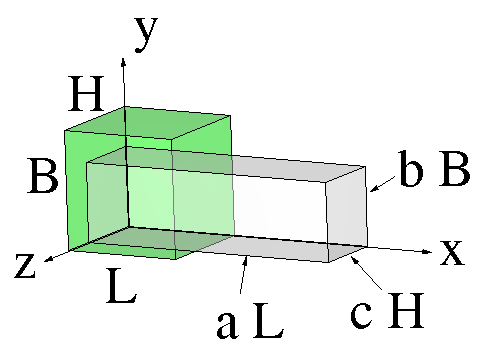 mini